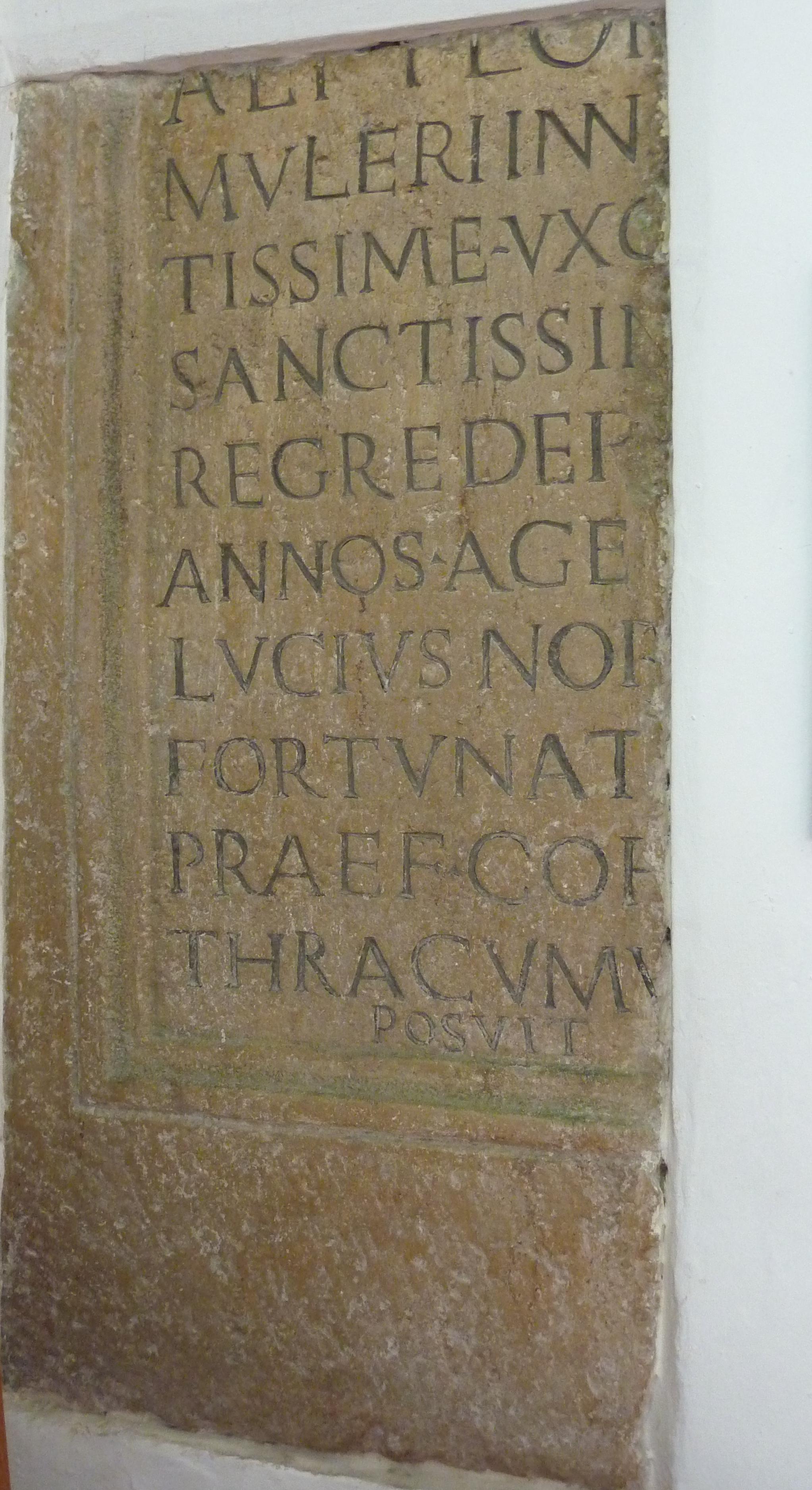 Evangelisch-lutherische Dreifaltigkeitskirche in Haunsheim, einer Gemeinde im Landkreis Dillingen an der Donau (Bayern), Fortunatusstein. CIL III 5880 = CIL III 11899: ---]ali[---]ilo / mulieri inno[cen]/tissimae uxo[ri] / sanctissim[ae cum] / regreder[etur] / annos age[nti ---] / Lucius Nor[eius] / Fortunat[us] / praef(ectus) coh(ortis) [III] / Thracum v[et(eranae)] / posuit